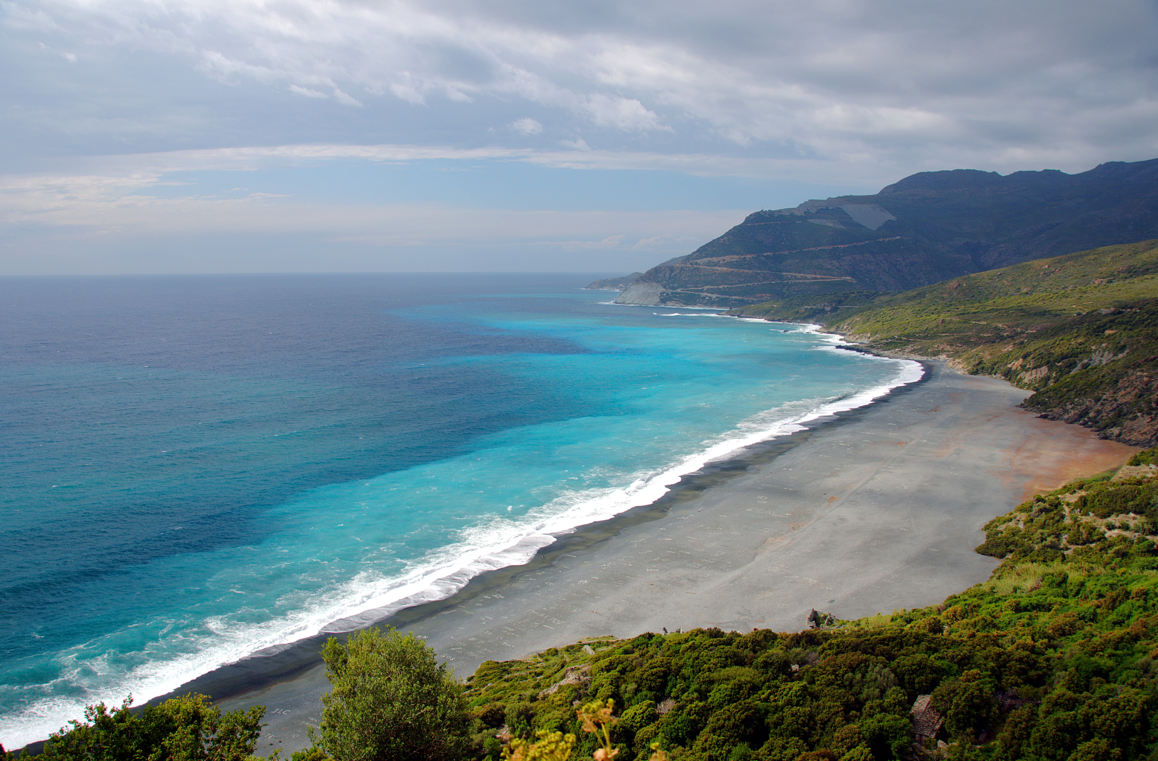 В северной части Нонцы расположен огромный пляж из черного песка и камней – результата выработки старинного асбестового карьера, закрытого в 1965 году